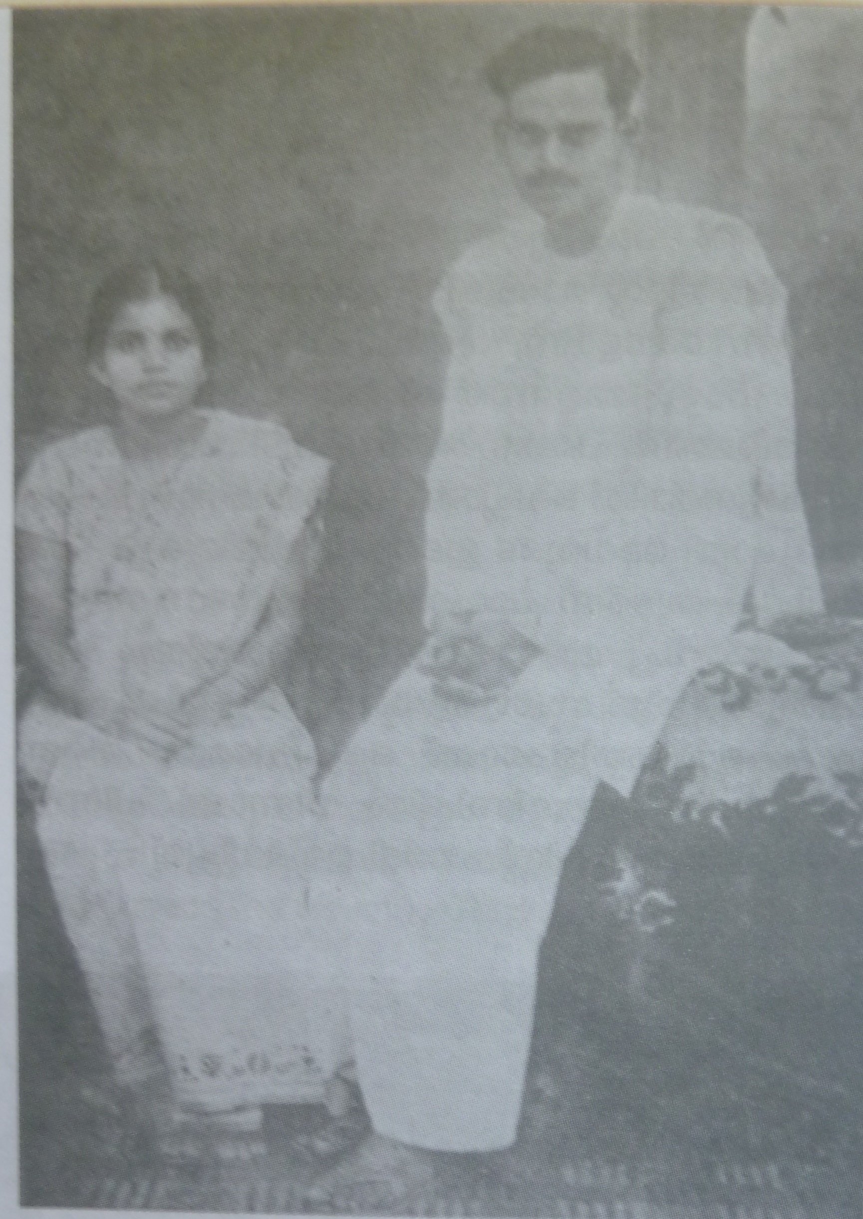 വി. ആർ. കൃഷ്ണനെഴുത്തച്ഛനും ഭാര്യ ലക്ഷ്മി ഭായിയും